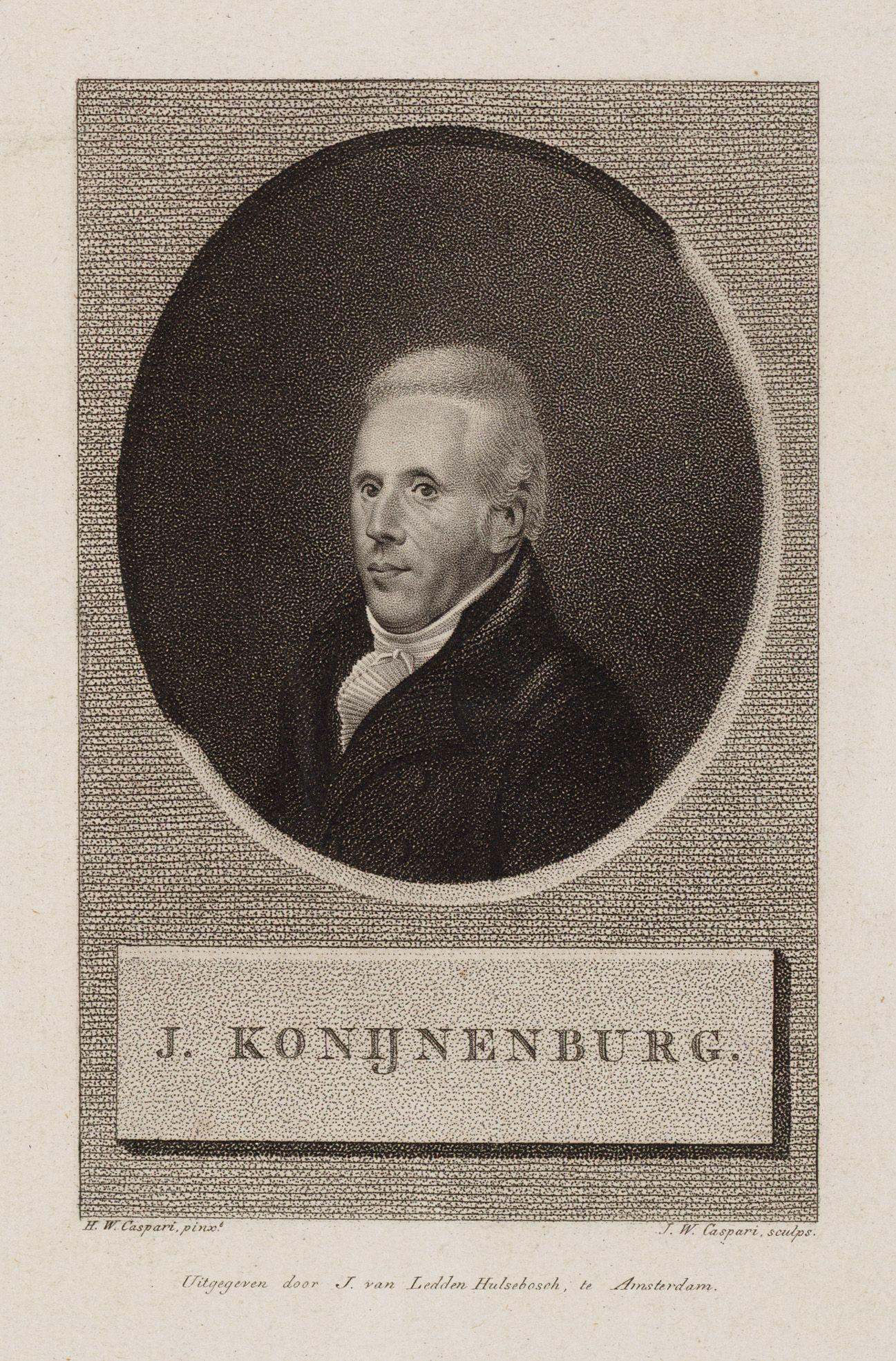 Beschrijving Jan Konijnenburg (08-12-1757 / 08-01-1831) Hoogleraar in de theologie aan het Remonstrants seminarium te Amsterdam. Naar een schilderij van H.W. Caspari. Afmetingen: 148 x 91 mm. Documenttype prent Vervaardiger Ledden Hulsebosch, J. van Caspari, Hendrik Willem (1770-1829) Caspari, Jan-Willem (1779-1822) Collectie Collectie Stadsarchief Amsterdam: tekeningen en prenten Inventarissen Afbeeldingsbestand 010097008747